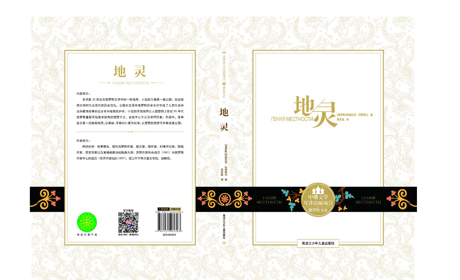 Обложка романа "Гений местности", вышедшего в 2019 году в Китае (Харбин, Хейлундзянское книжное издательство) (перевод Дунцин Хуан).